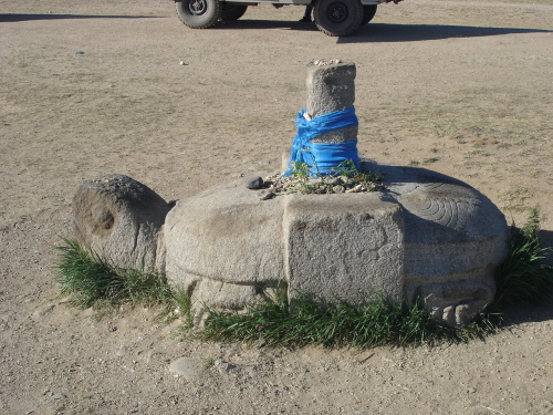 Statue de tortue - Nord de Karakorum (Mongolie)